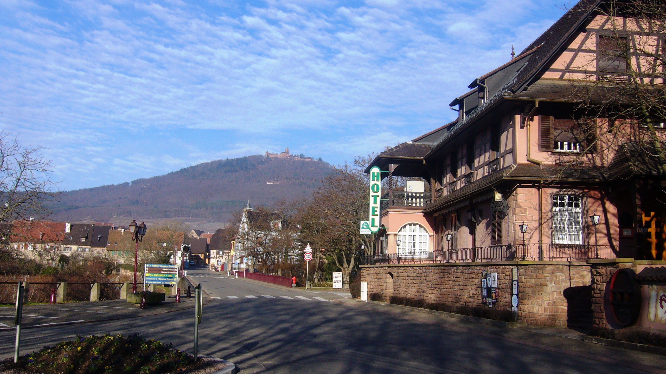 L'entrée du village de Saint-Hippolyte